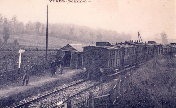 Ytres: arrêt du chemin de fer